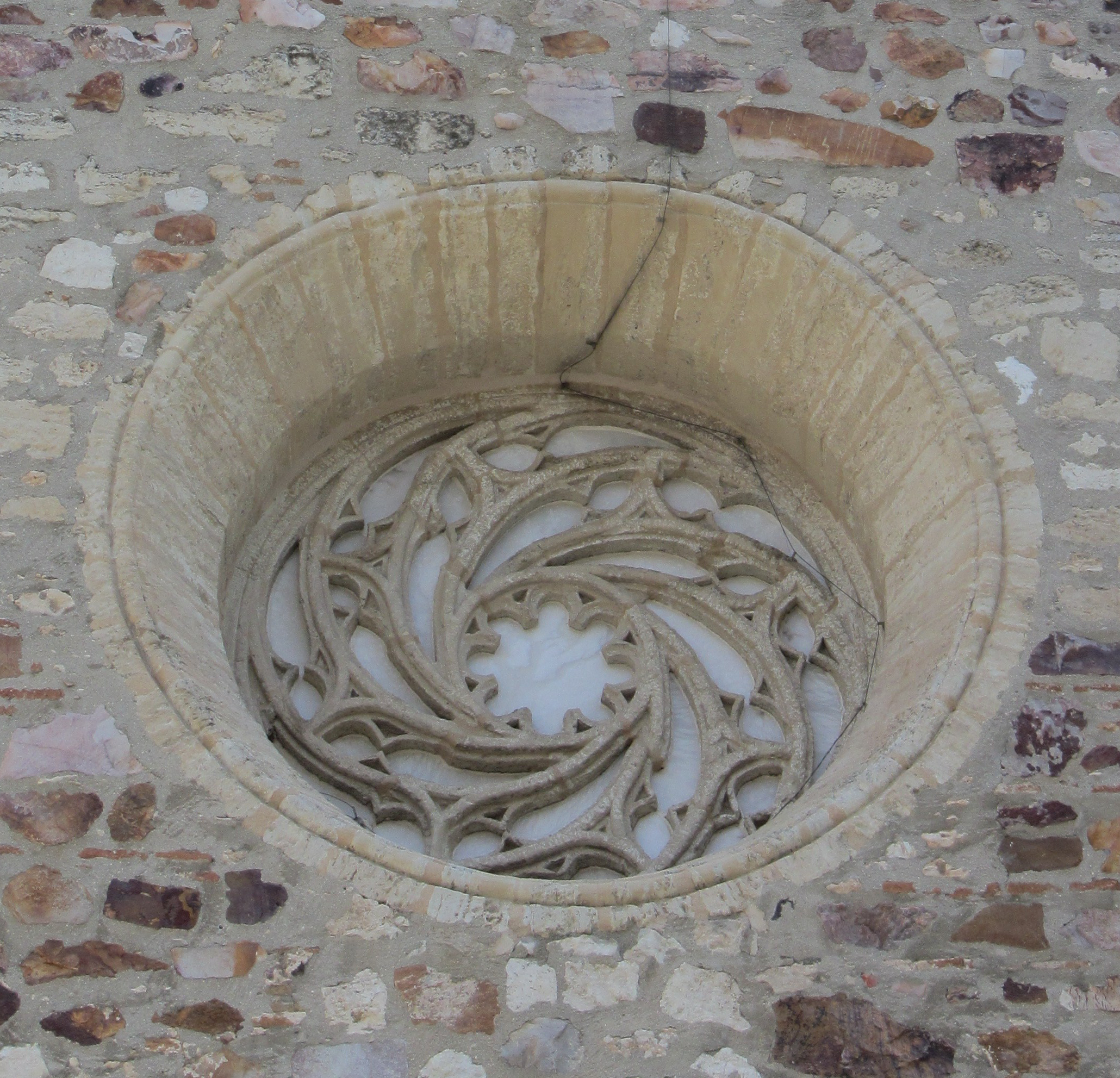 Rosetón sobre la puerta del Perdón de la Iglesia de San Pedro en Ciudad Real (España) de la segunda mitad del siglo XIV. Es un rosetón de tracería calada de clara ascendencia mudéjar, cuyo tema es el de la rueda giratoria y el movimiento continuo, es decir, la luz como divinidad.